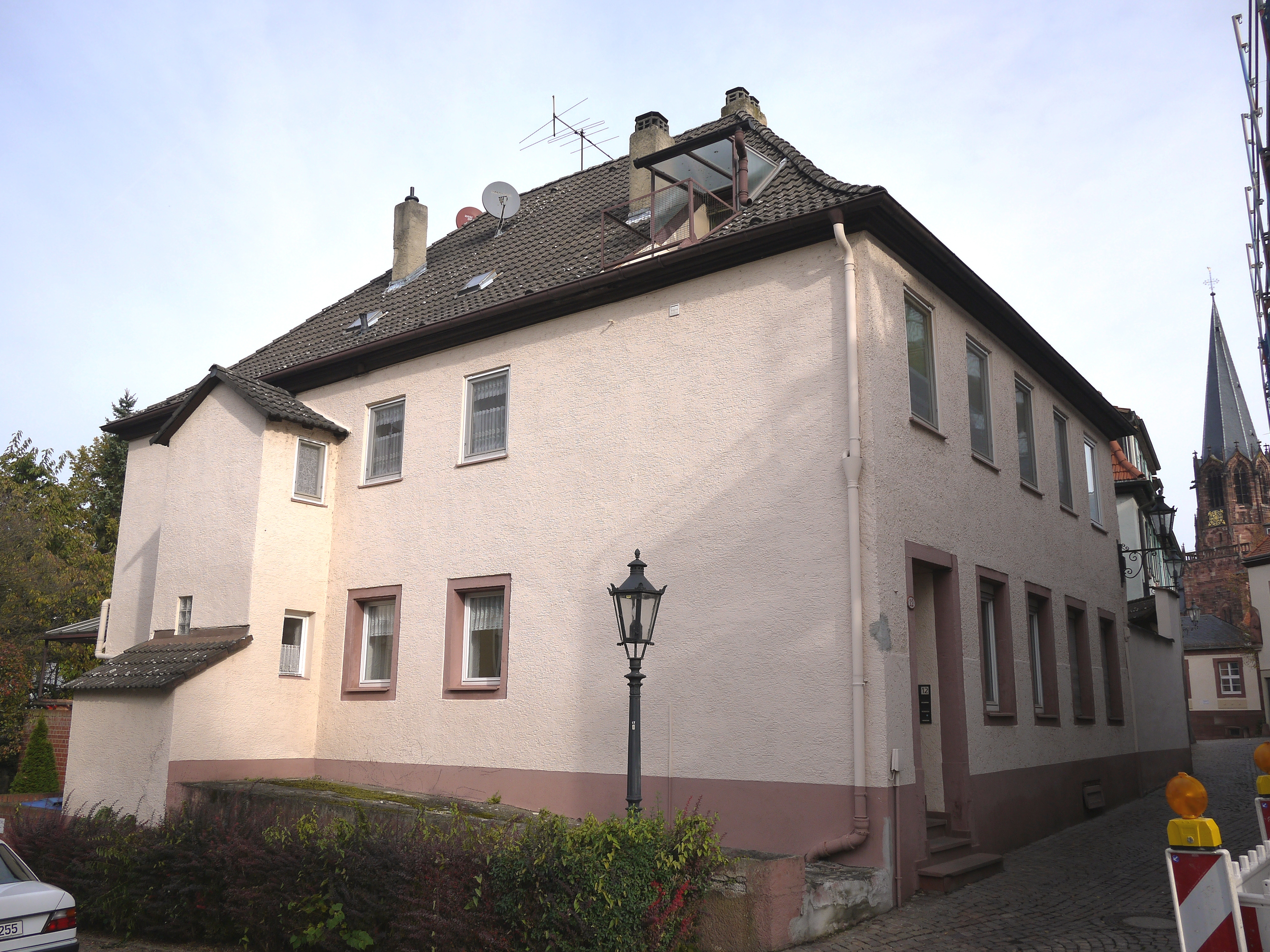 Stiftsgasse 12 in Aschaffenburg, dnkmalgeschützt, Ehem. Stiftshaus "Zum Trappen", zweigeschossiger Walmdachbau mit verputztem Fachwerkobergeschoss, 1804 von Michael Streiter; gotisches Hoftor.